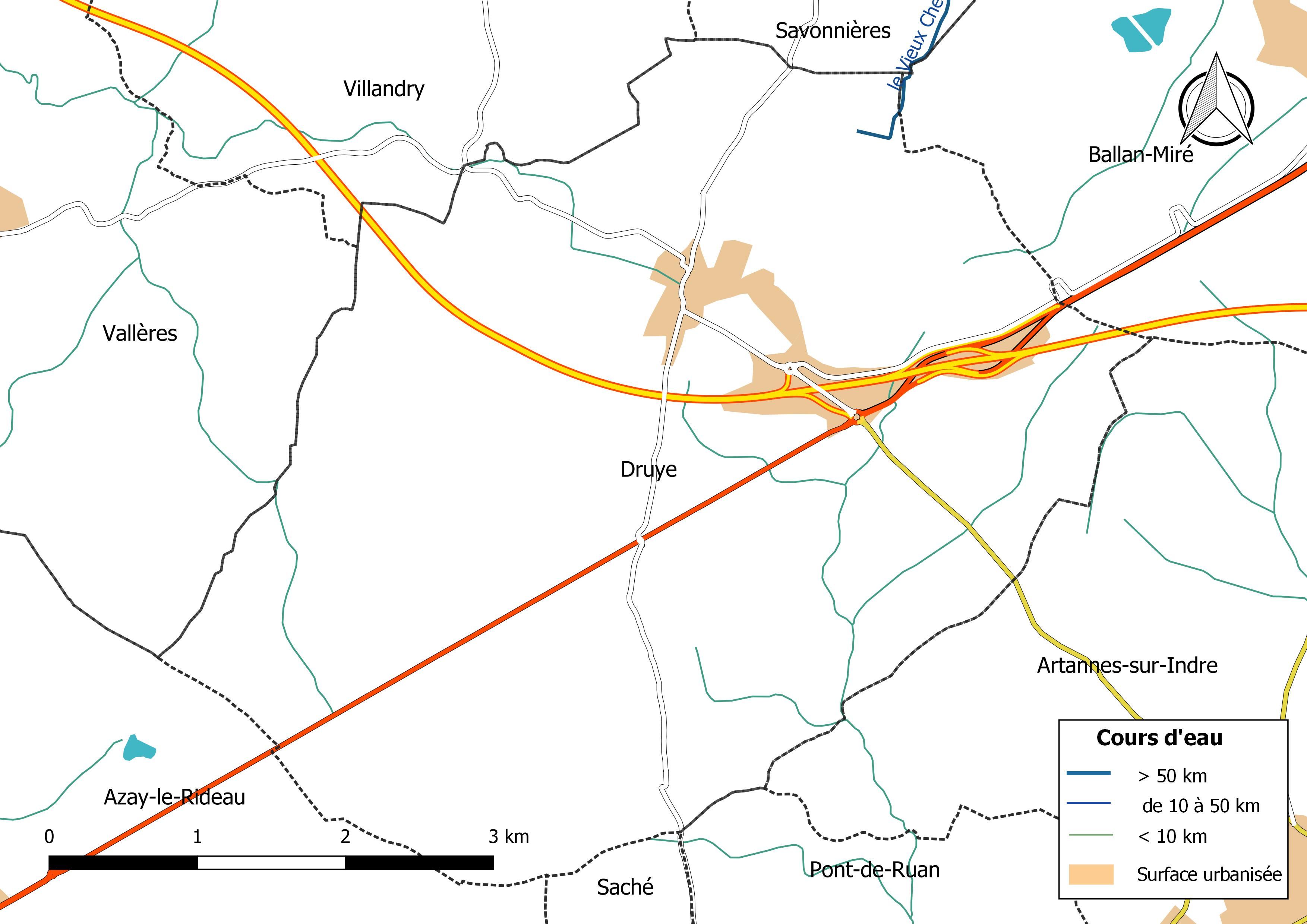 Carte du réseau hydrographique de la commune de Druye (France).